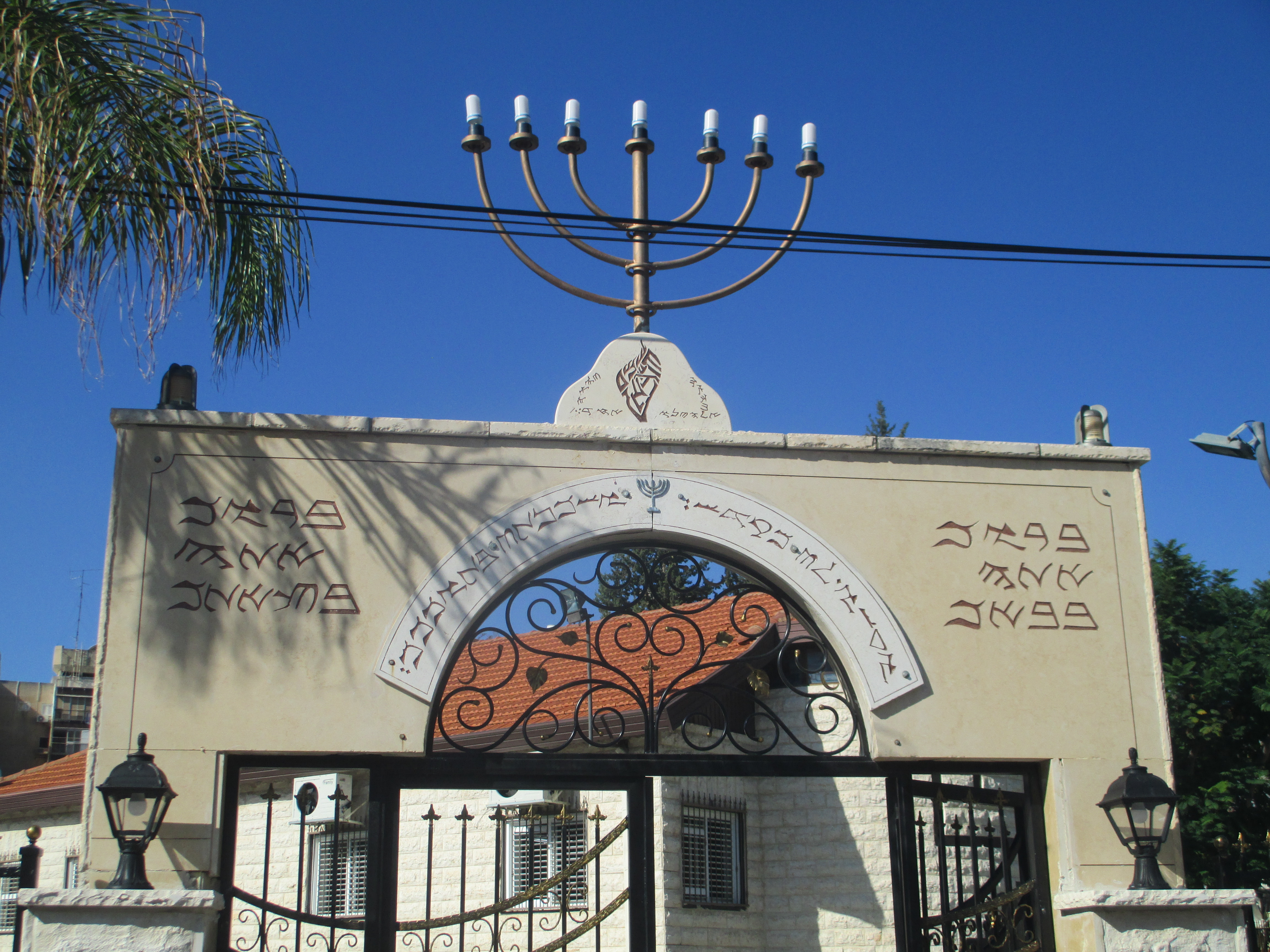 הכניסה לבית הכנסת בשכונה השומרונית בחולון